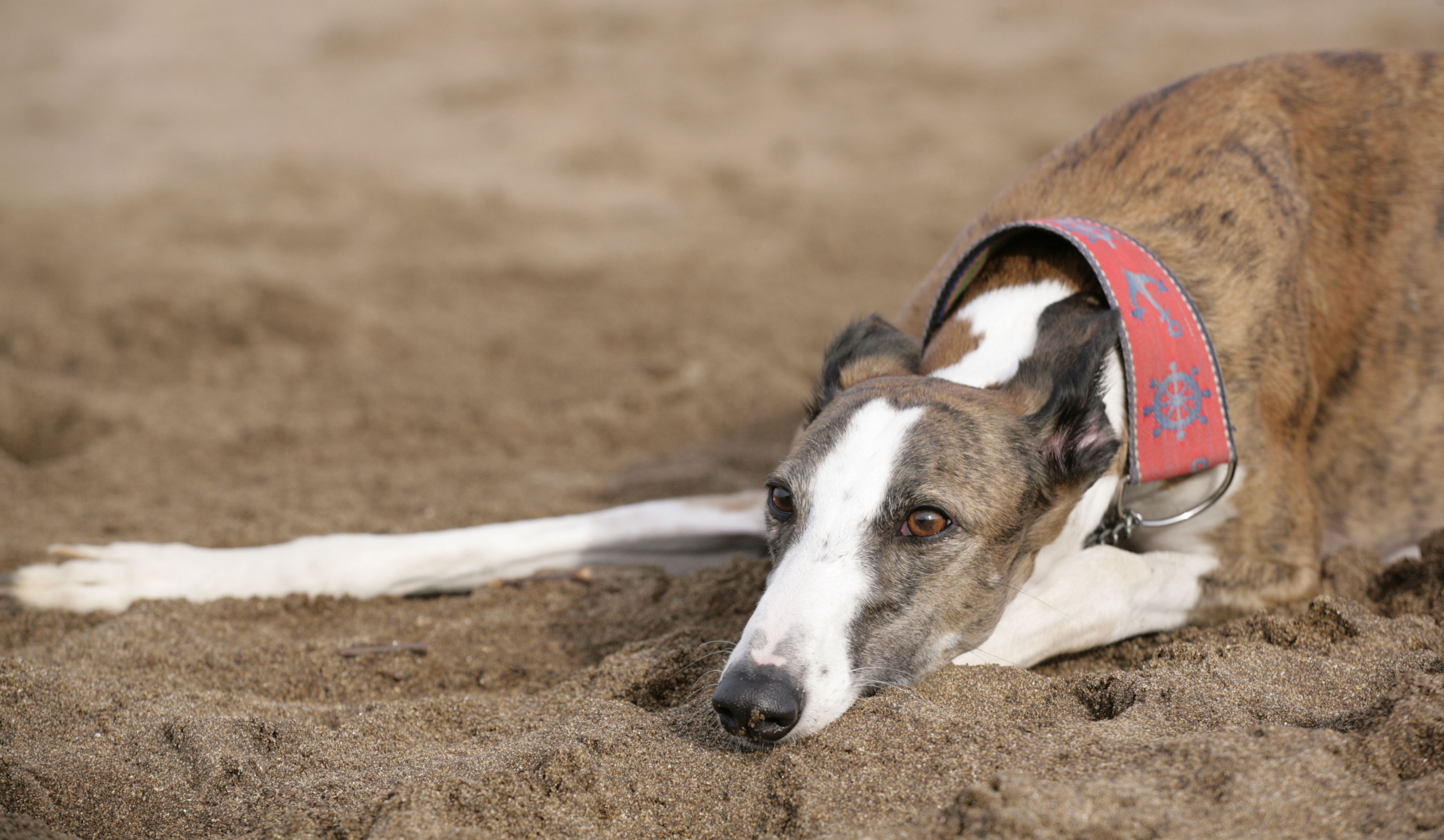 Galgo Español adoptado en Asturias